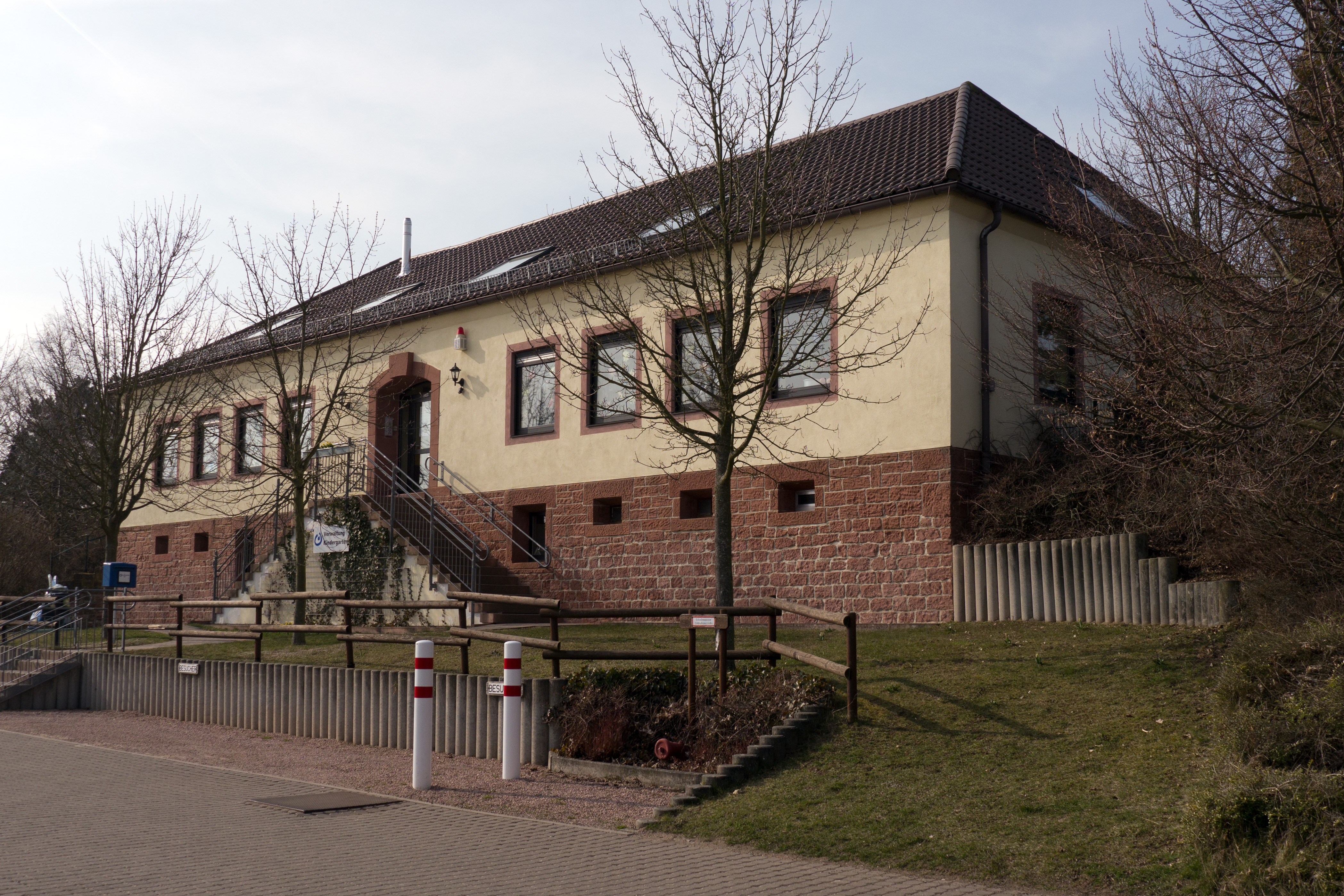 Ehemaliger Rundfunksender Kaiserslautern